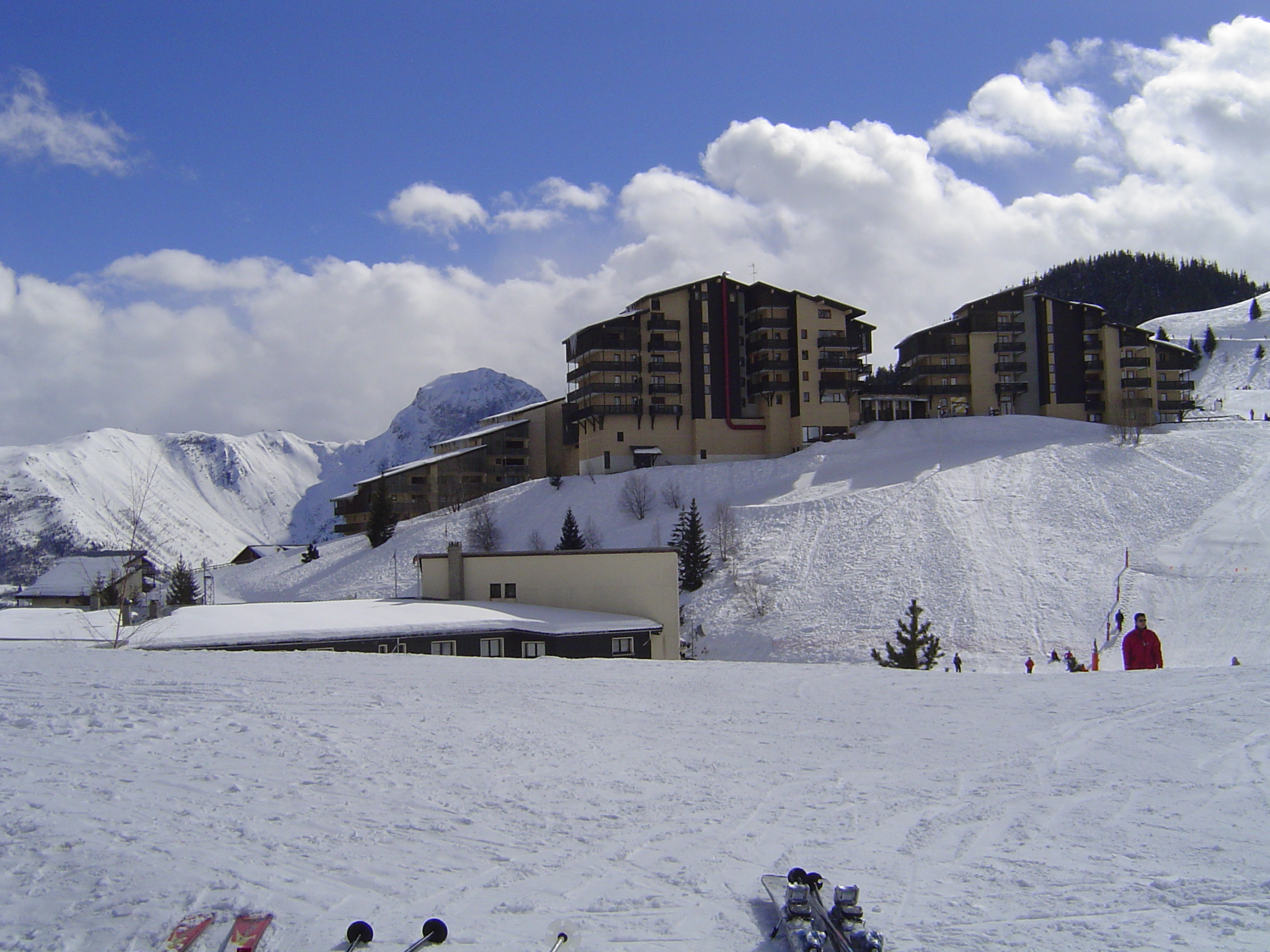 La station de ski d'Auris en Oisans (France)